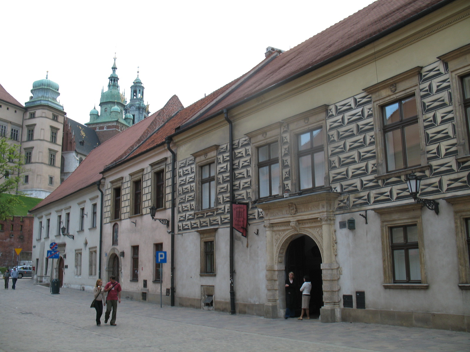 Ulica Kanonicza w Krakowie; Kanonicza Street in Kraków